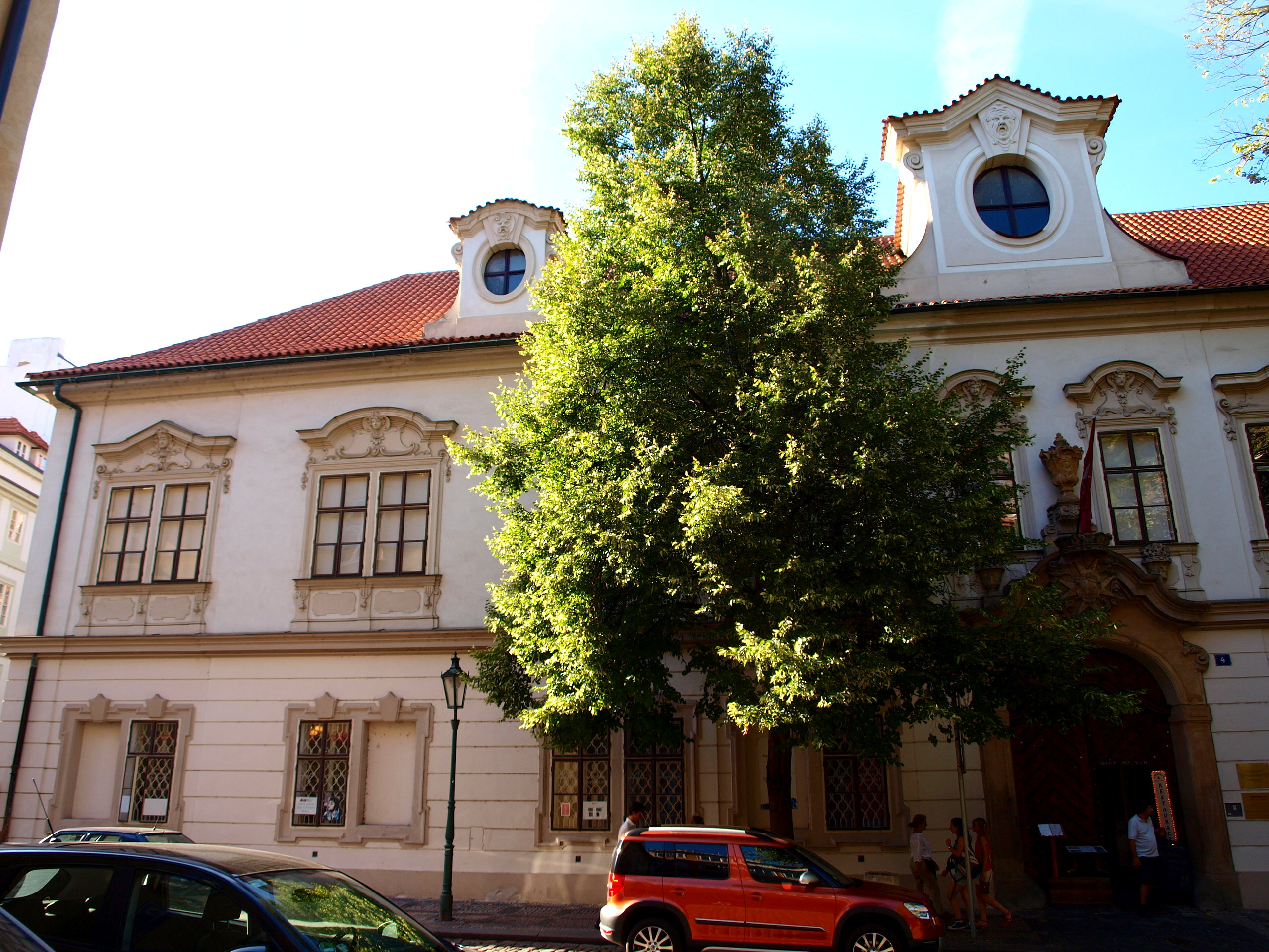 Velkopřevorský palác, Malá Strana